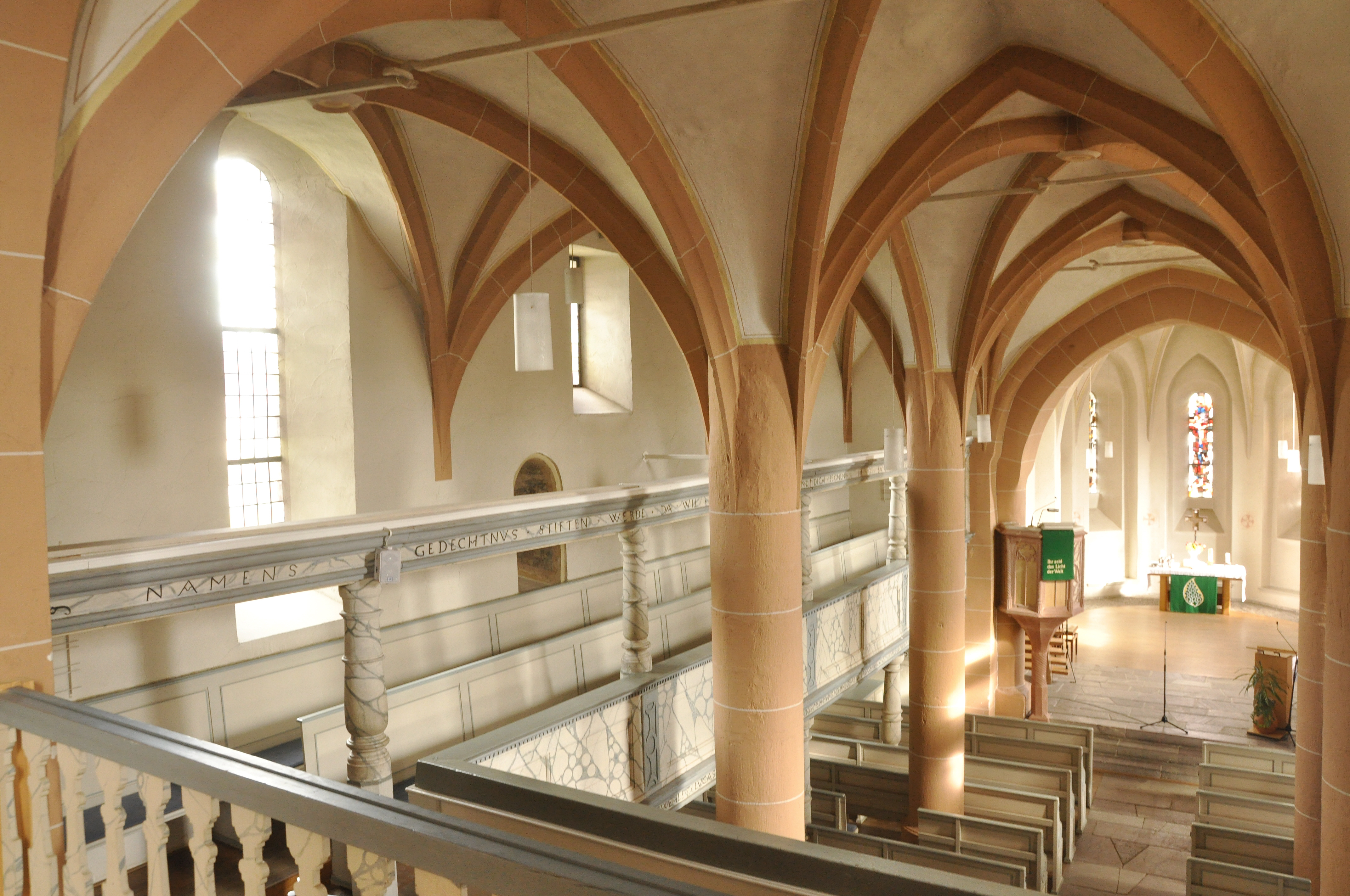 Blick von der Westempore nach Nordosten